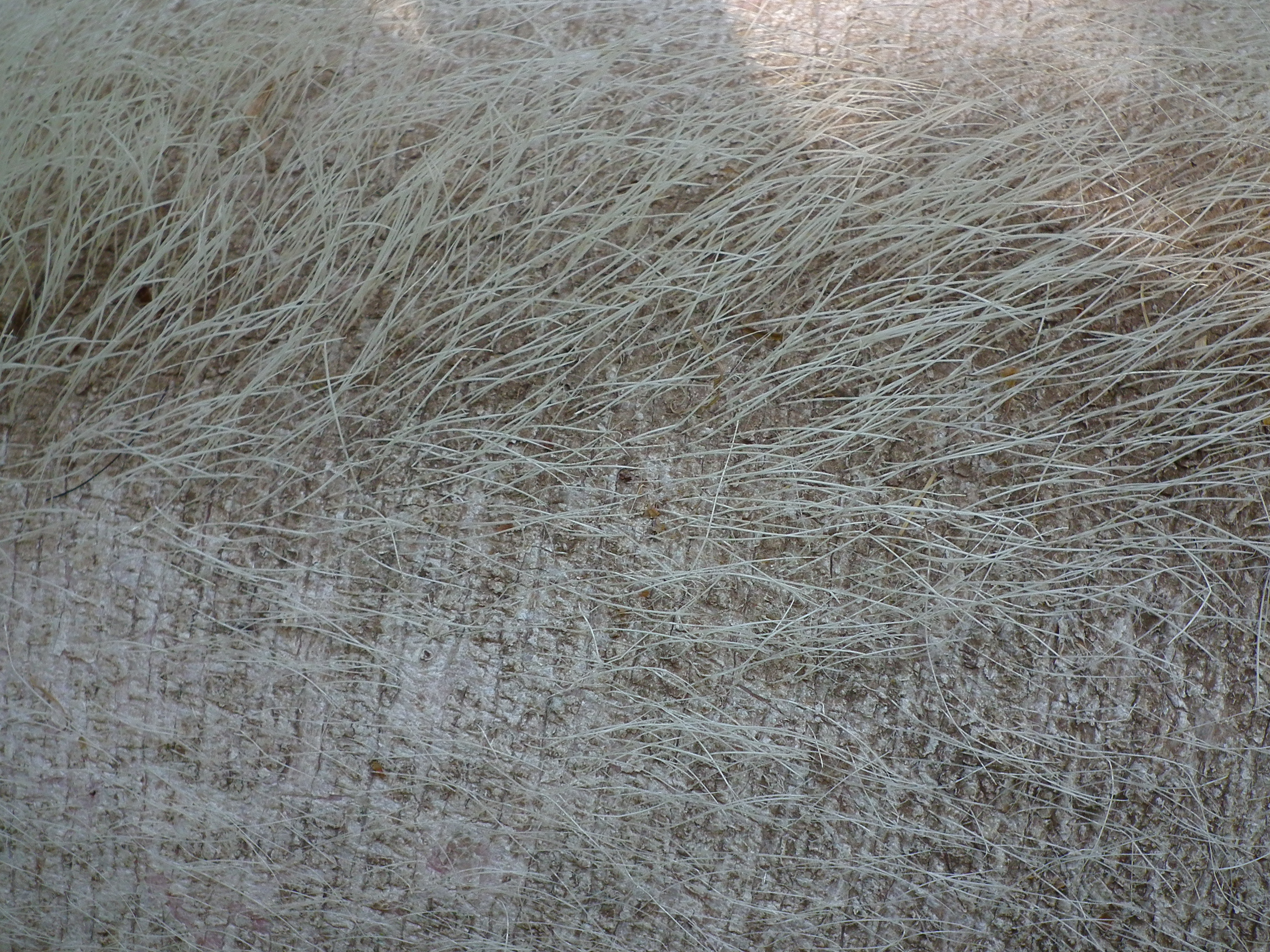 Haut und Borsten eines Hängebauchschweins, fotografiert im Bergtierpark Erlenbach (Hessen, Deutschland)